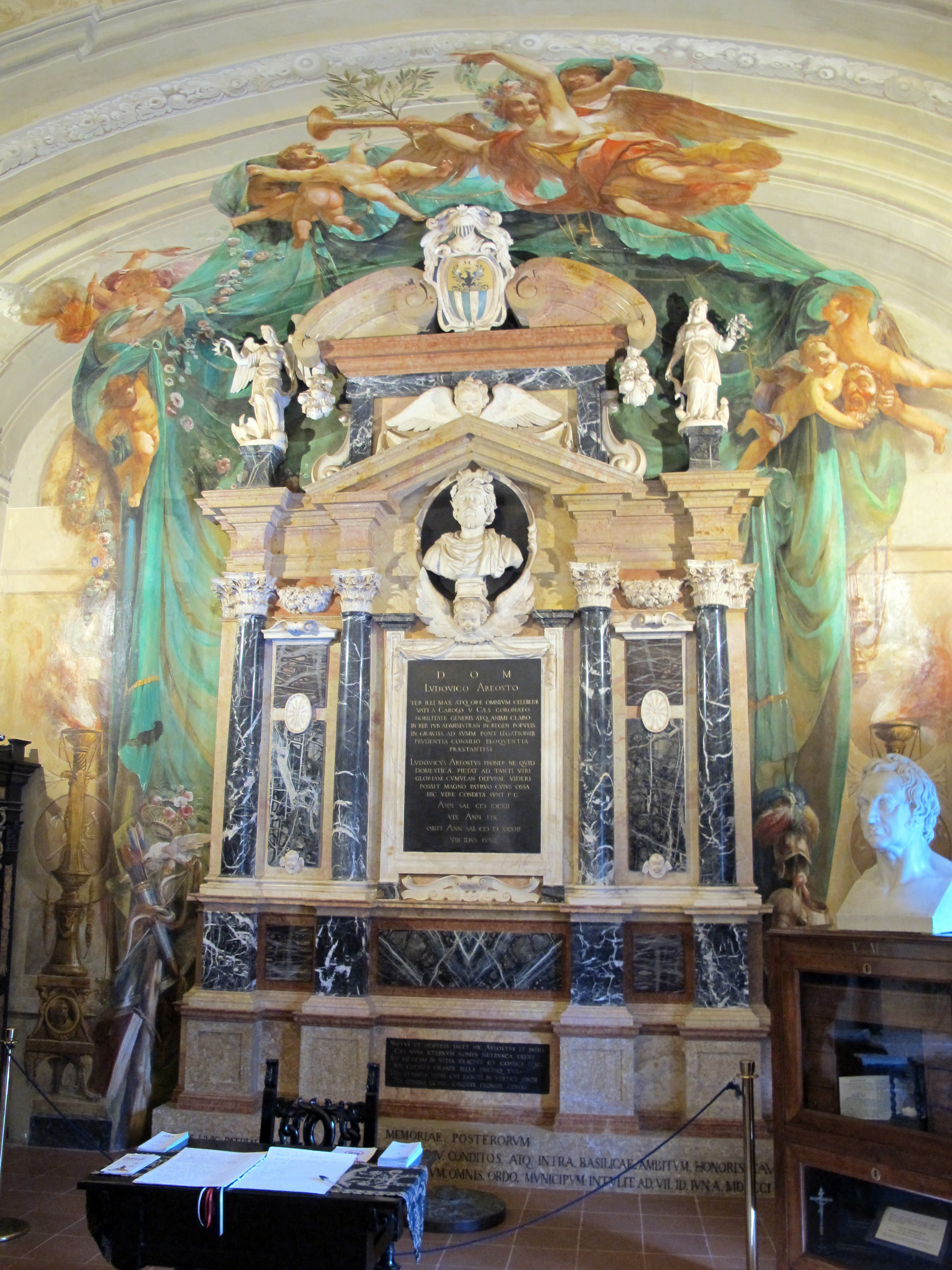 Palazzo Paradiso This is a photo of a monument which is part of cultural heritage of Italy.